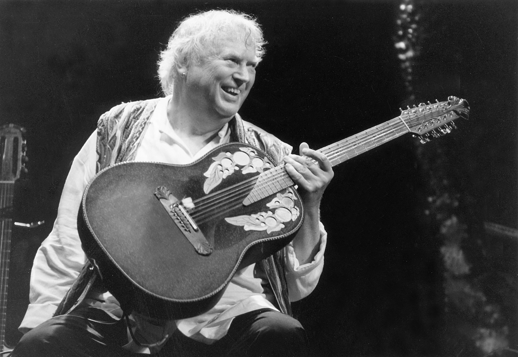 Sigi Schwab (* 5. August 1940 in Ludwigshafen am Rhein) live auf Toollwood